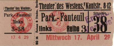 Eintrittskarte für das Theater des Westens in Berlin-Charlottenburg, 1929